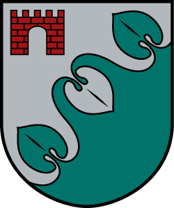 Limbažu novada ģerbonis